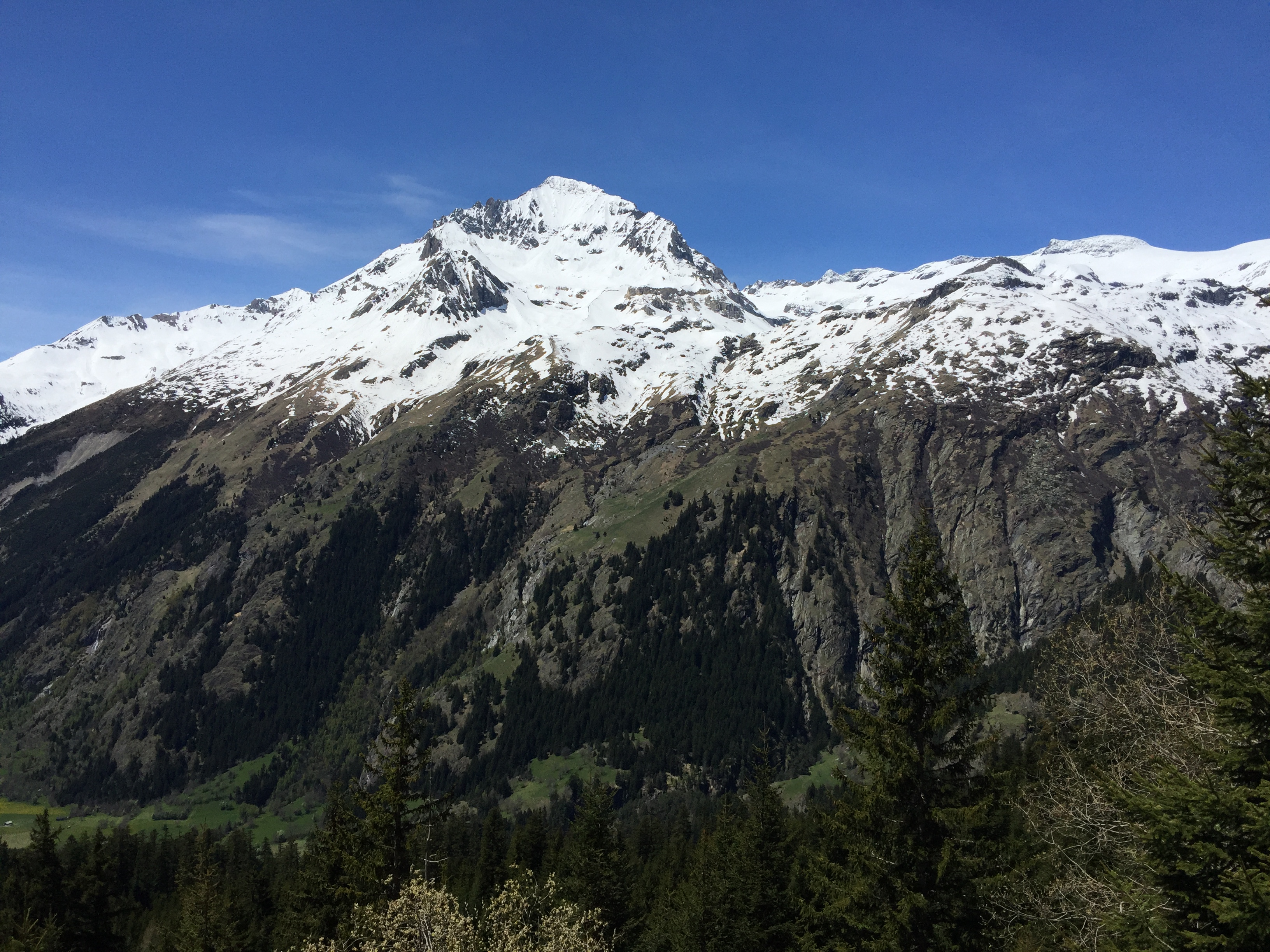 La dent Parraché un des sommets de la haute Maurienne